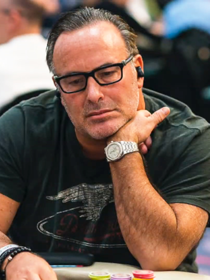 Dan Shak beim WPT Legends of Poker